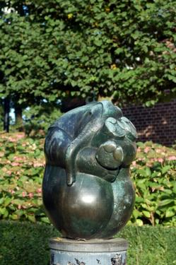 Bronze elephant,sculptress Miep Maarse, Leusden, the Netherlands